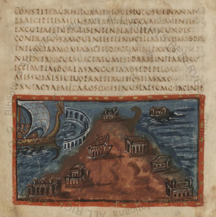 Folio 31v des Vergilius Vaticanus: Aeneas umsegelte Sizilien und landet in Drepanum (Aeneas 3.692-708). Der Vergilius Vaticanus ist ein illustrierter antiker Codex mit dem Gesamtwerk des Vergil. Er war wahrscheinlich ein Lesebuch für Kinder und befindet sich heute im Vatikan. Die Datierungen schwanken von 340 bis 420. Somit ist dieser Codex entweder der älteste oder einer der 10 ältesten überlieferten Codices. Es gibt auch keine überlieferten Rollen mit diesem Alter. Der Codex bestand ursprünglich aus 440 Blättern (ca. 24 x 22 cm) von denen noch 75 erhalten sind. Das Bild zeigt etwa 90% des Blattes und ist eine kontrastkorrigierte Weisslicht-Aufnahme um bei gleichem Bildeindruck Farbflecken und Fehlstellen deutlicher zu machen. Das Gemälde hat im Original etwa gleiches Aussehen, das Pergament ist weniger bräunlich, das Bild ist aber nicht retouchiert. Die sehr geringen Schäden repräsentieren tatsächlich so diese nach 1600 Jahren gut erhaltene Seite. Andere erhaltene Blätter des Codex haben mitunter abgeplatzte Malfarbe, aber immer eine noch lesbare Schrift. Dieses Beispiel zeigt, dass aus rein technischer Sicht die Überlieferung der Bücher von vor 300 auch möglich gewesen wäre.